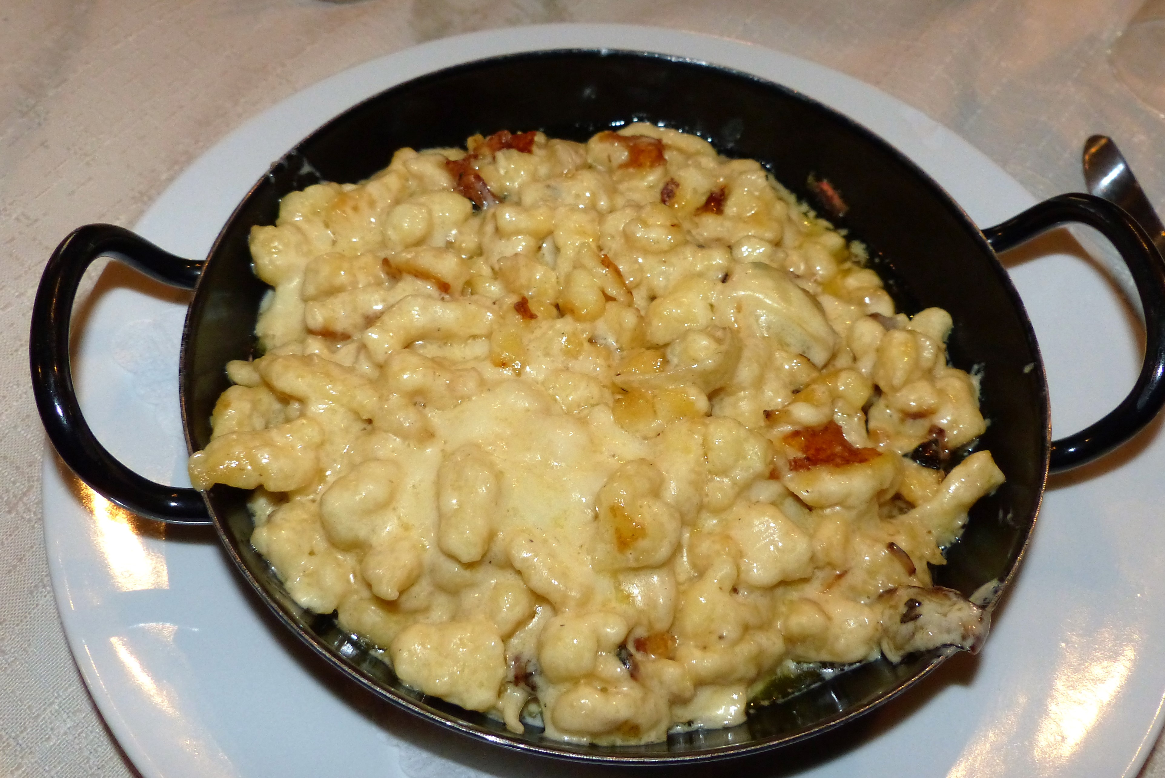 Käsenockerl im Restaurant Kadros in Wien